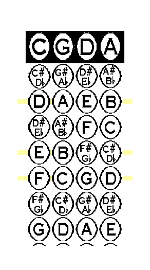 Viola finger chart.